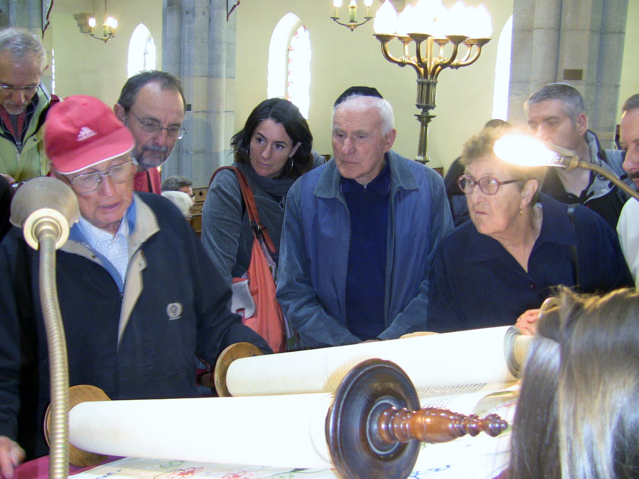 Torah de la Synagogue de Besançon. - photo prise à l'occasion de la journée du patrimoine